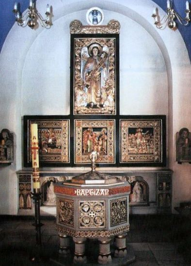 Chrzcielnica w kościele w Chropaczowie